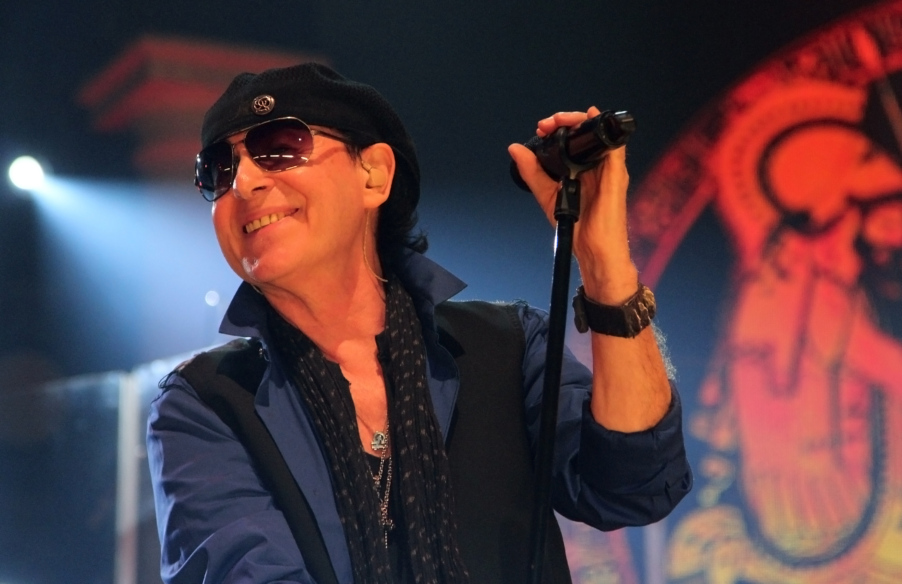 Klaus Meine - Scorpions Unplugged April 2014